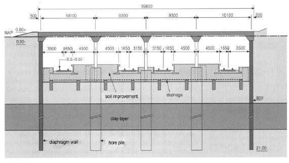 bouwmethode station Rijswijk auteur: TU Delft, faculteit Civiele Techniek en Geowetenschappen, Leerstoel Ondergronds Bouwen